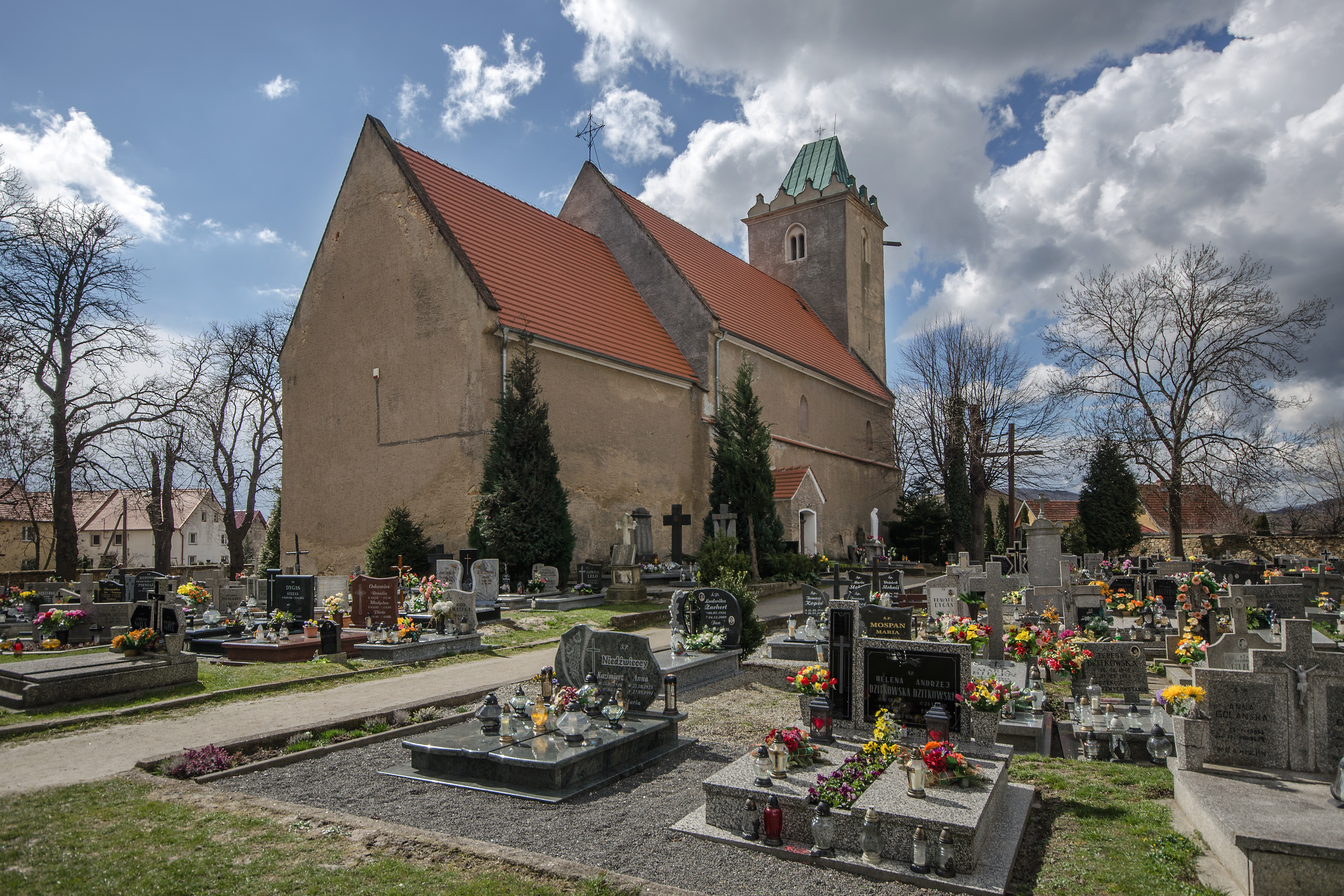 Paszowice, kościół par. p.w. Św. Trójcy, XIII, XIV, XVII